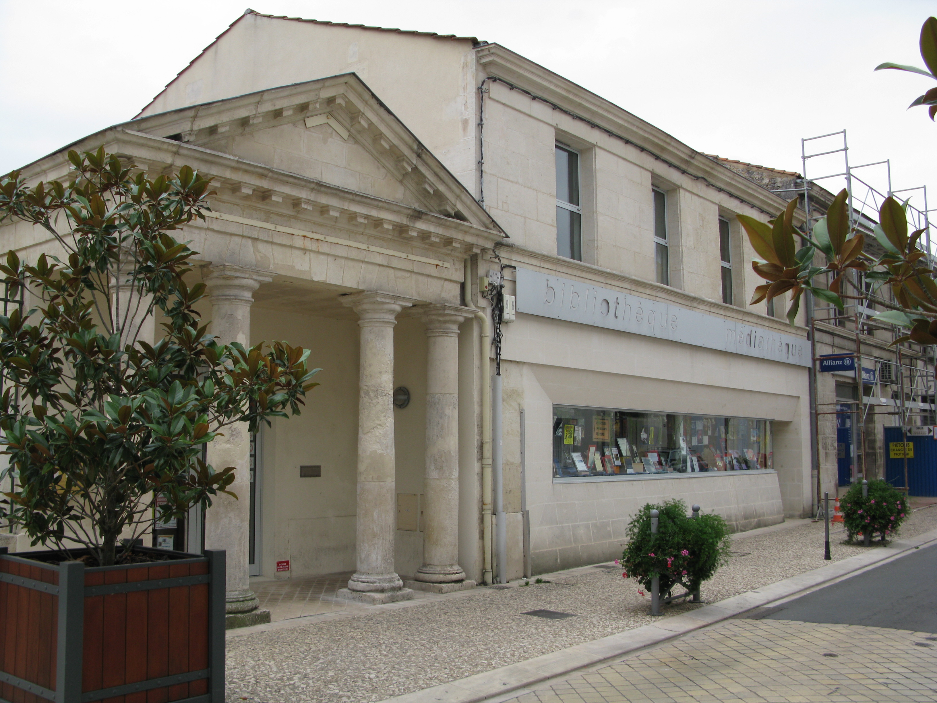 La bibliothèque municipale de Tonnay-Charente